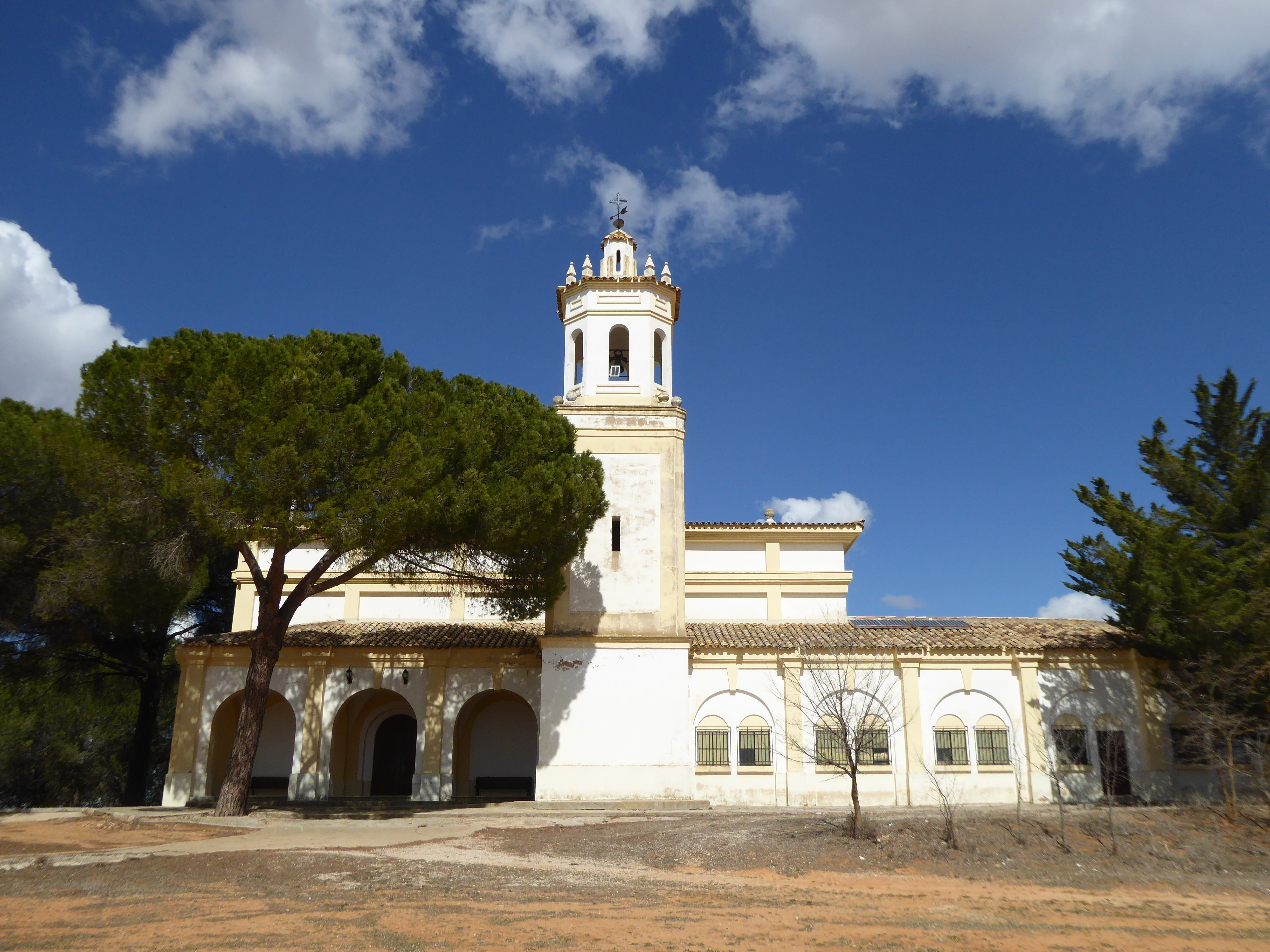 Buenache de Alarcón